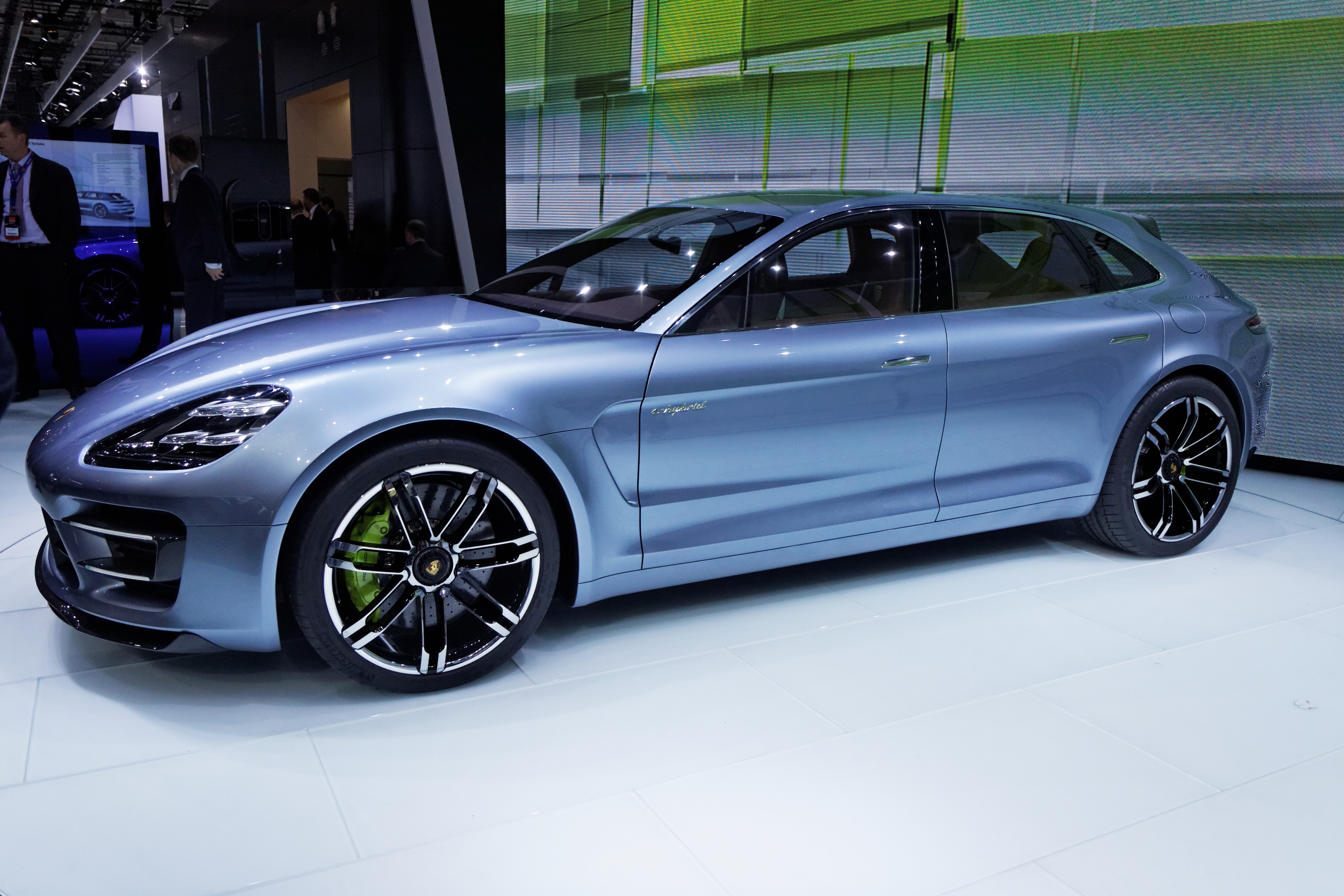 une Porsche Panamera Sport Turismo e-hybrid présentée lors du Mondial de l'automobile de Paris 2012.